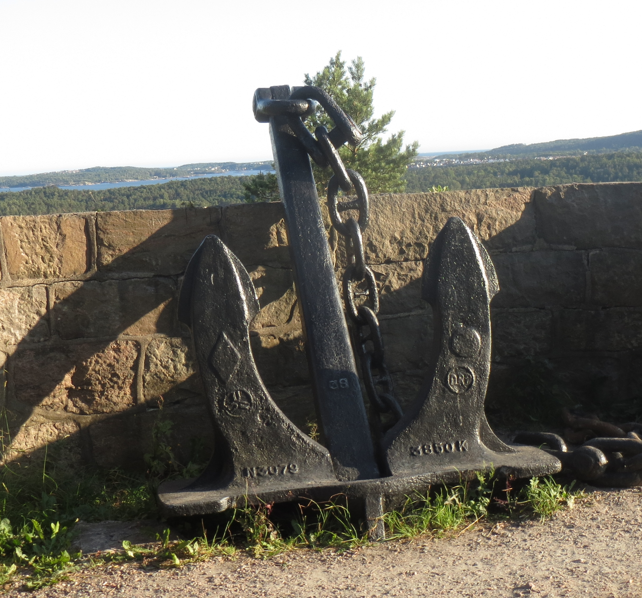 Anker @ Vestre Batteri, Odderøya, Kr.sand